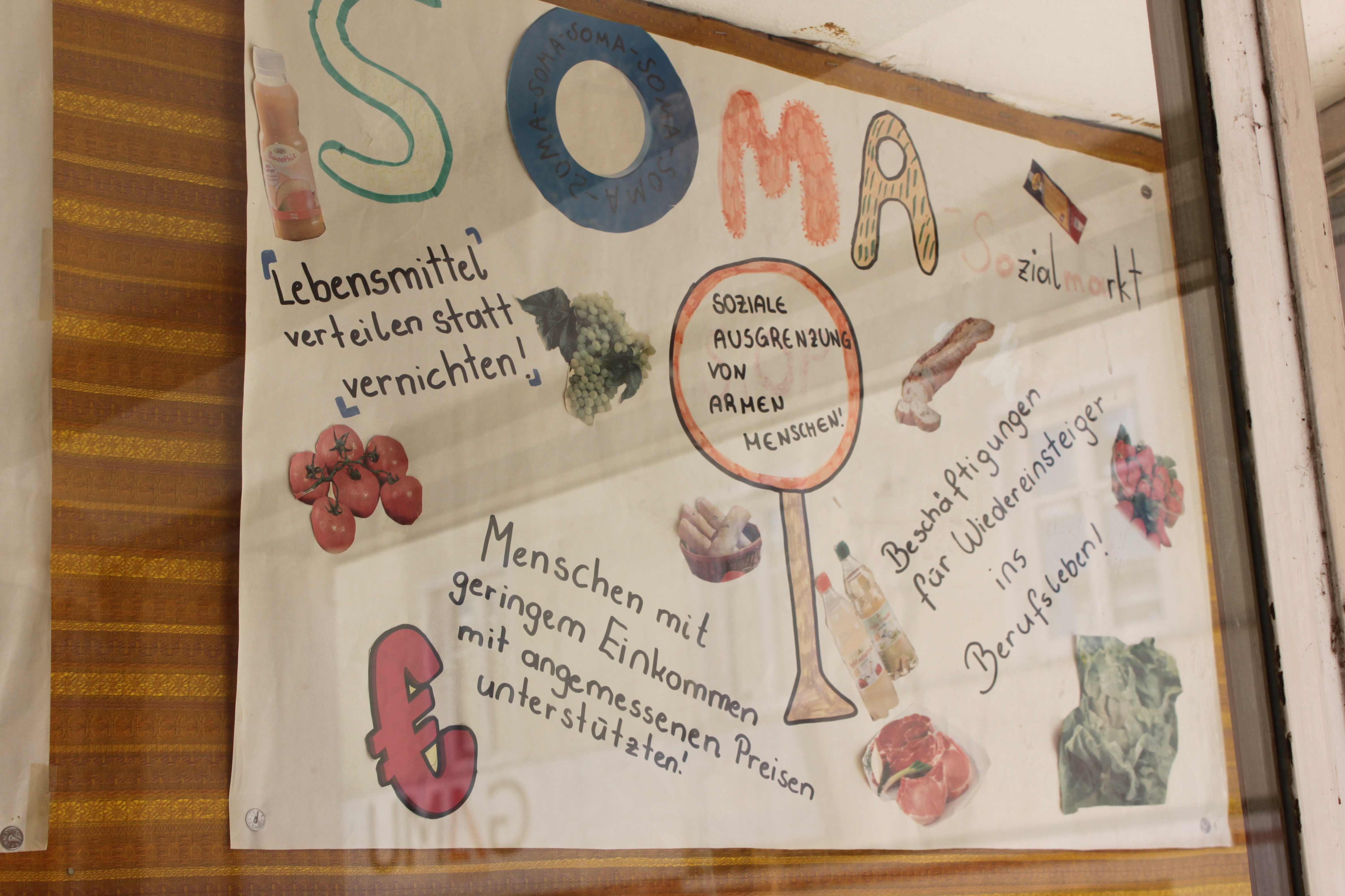 SOMA Sozialmarkt in St. Pölten, Informationsplakat im Schaufenster